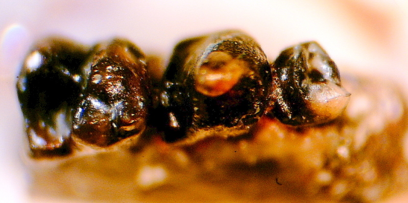 Tatmanius szalayi Bown & Rose